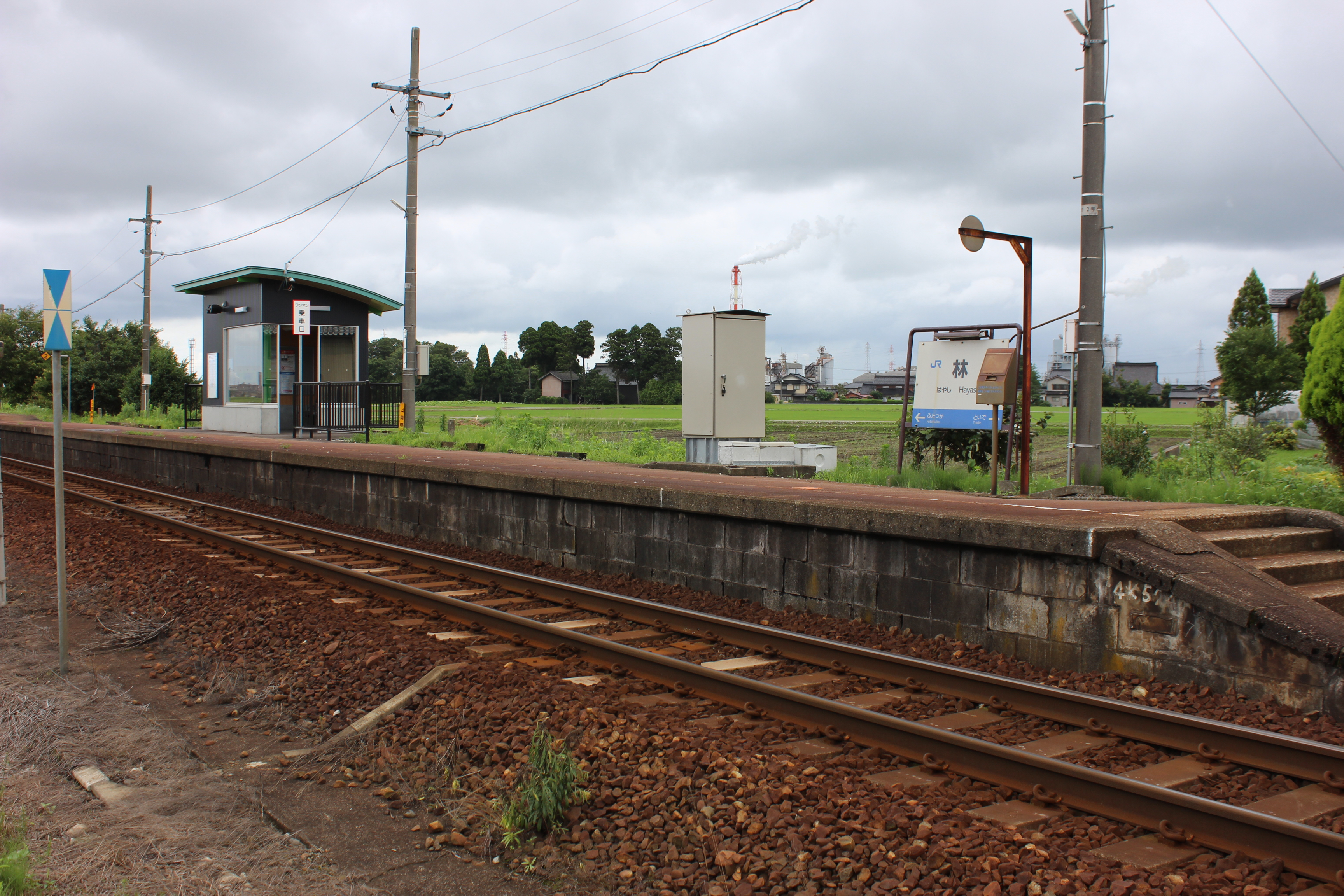 林駅（富山県高岡市） Canon EOS Kiss X5